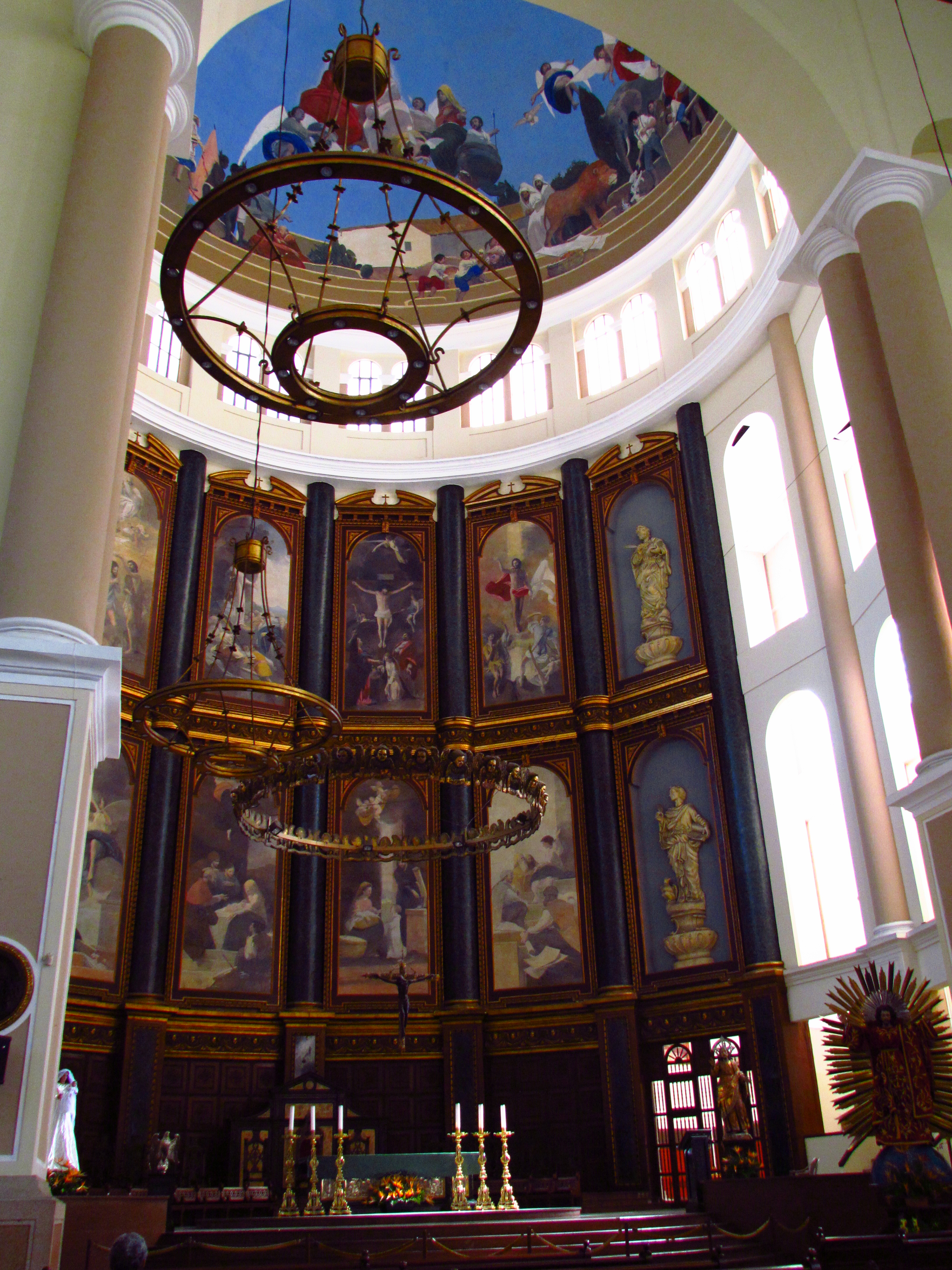 Arte interna de la Catedral de San Salvador